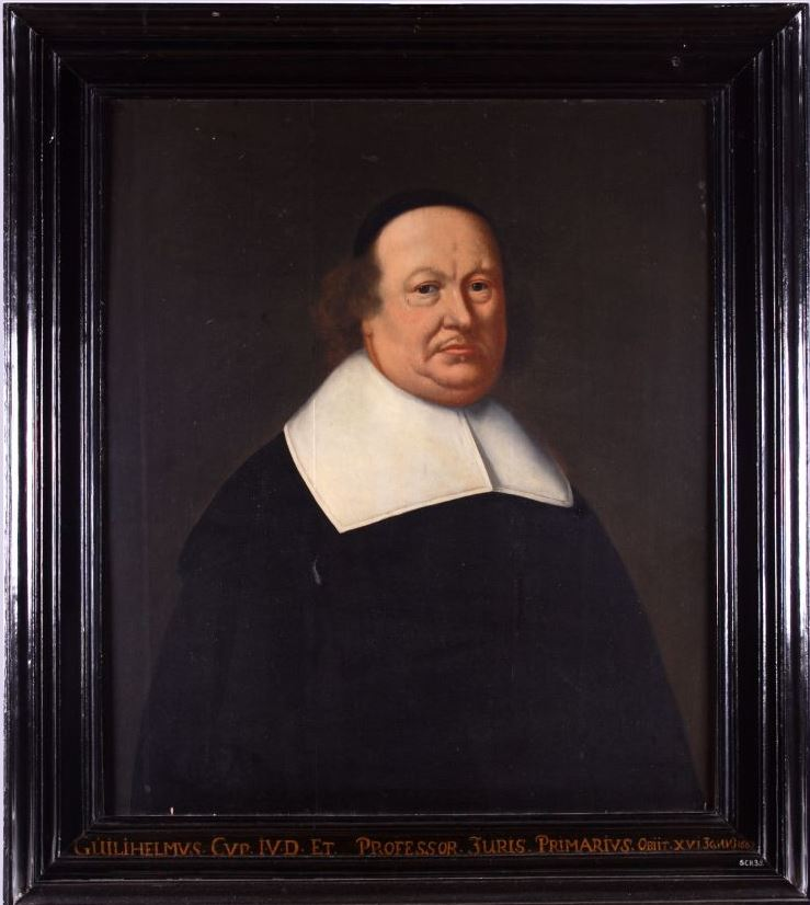 Portret in olieverf van Willem Cup, professor in de rechten aan de Franeker universiteit van 1674 tot 1667.